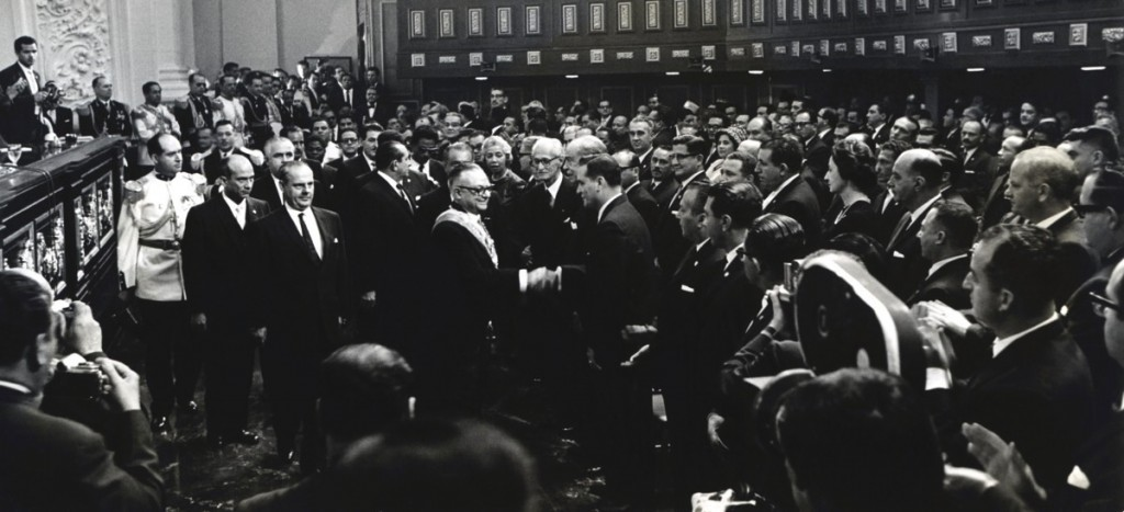 Rómulo Betancourt, presidente de la República, saluda a Wolfgang Larrazábal, ex candidato presidencial, después de su juramentación en el Hemiciclo del Congreso Nacional (Actual Asamblea Nacional). Caracas, 13 de febrero de 1959. Archivo Fotografía Urbana.